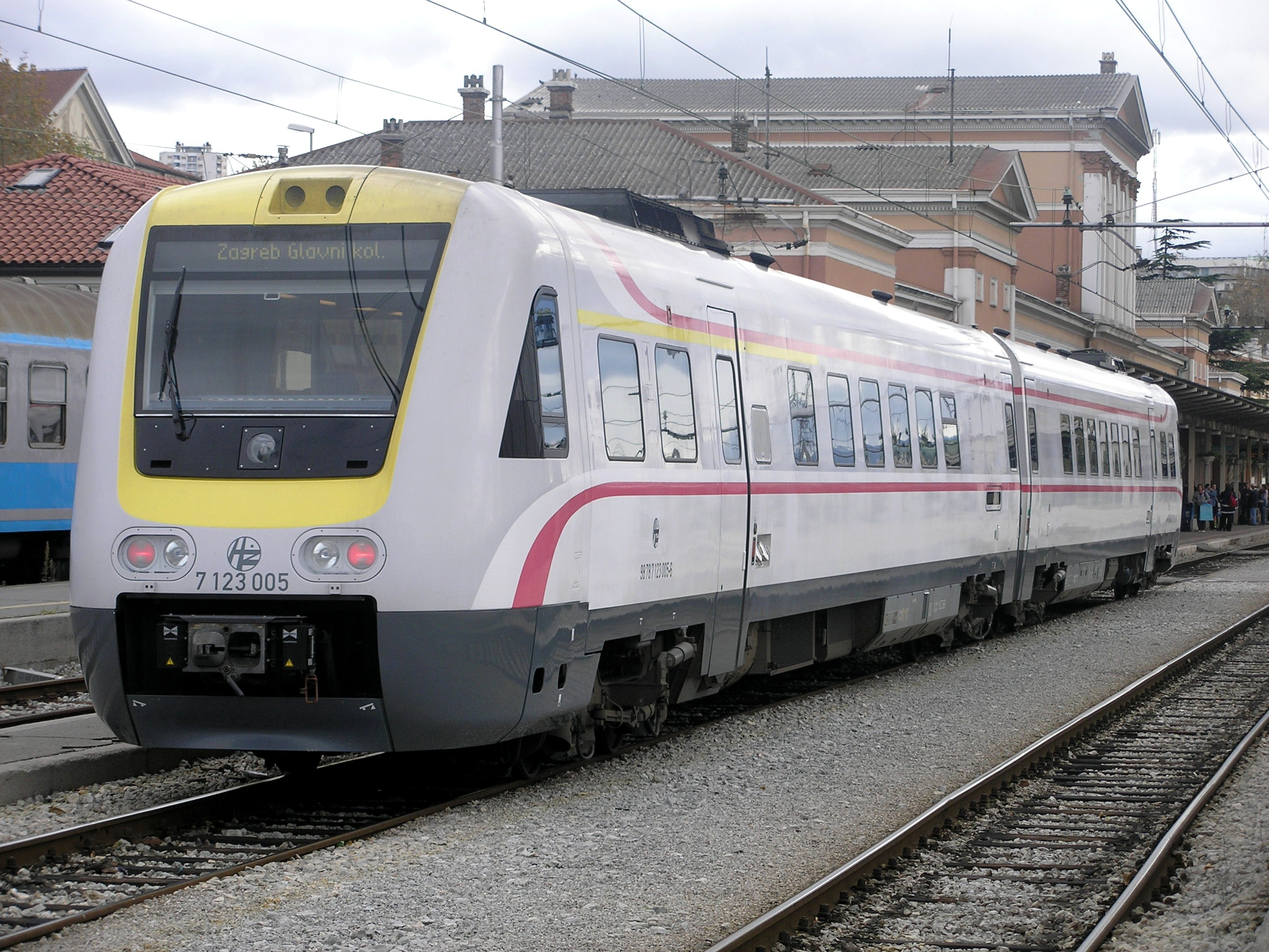 HŽ 7123 series DMU in Rijeka, CroatiaVlak serije HŽ 7123 u Rijeci, Hrvatska